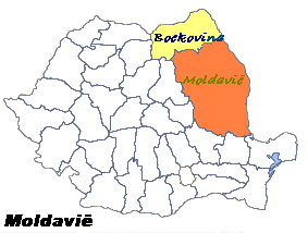 Moldavië (Moldova).